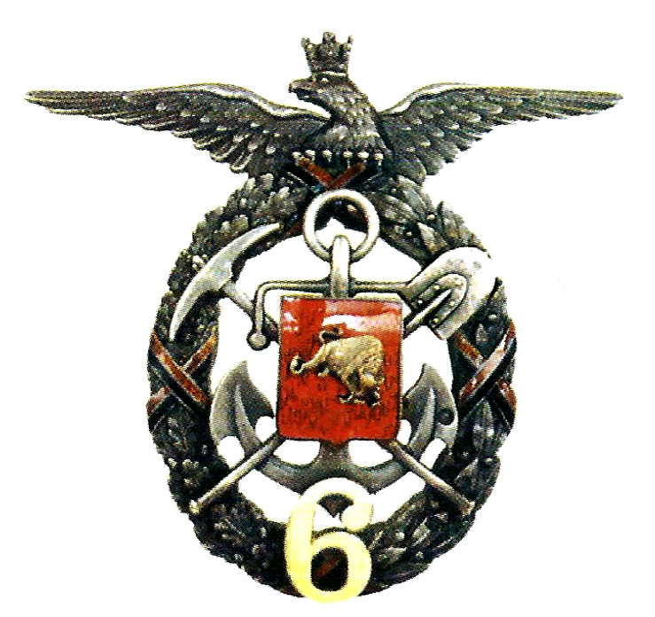 Odznaka pamiątkowa 6 psap